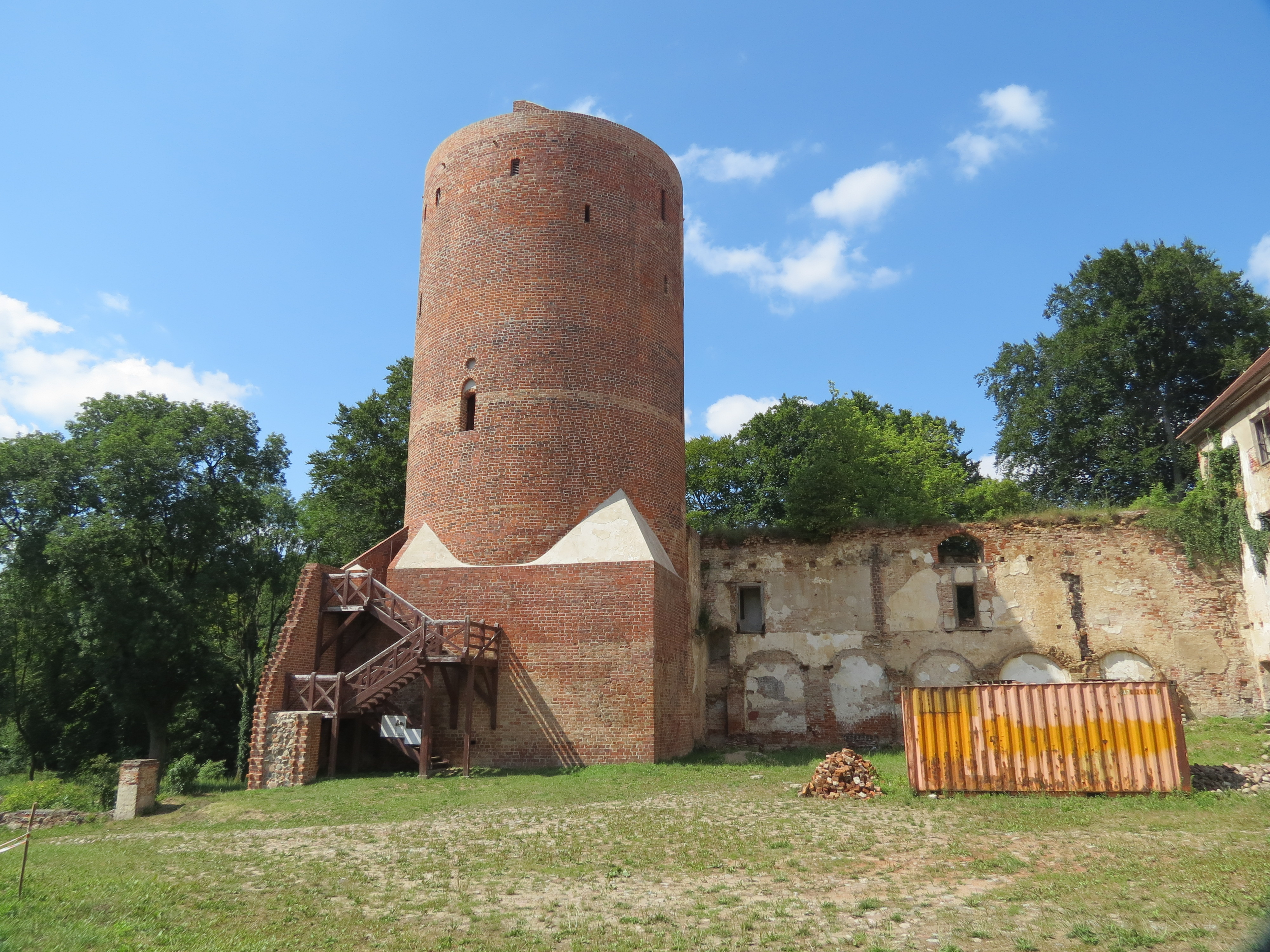 Schloss Wildenbruch/Zamek Swobnica, Gmina Banie